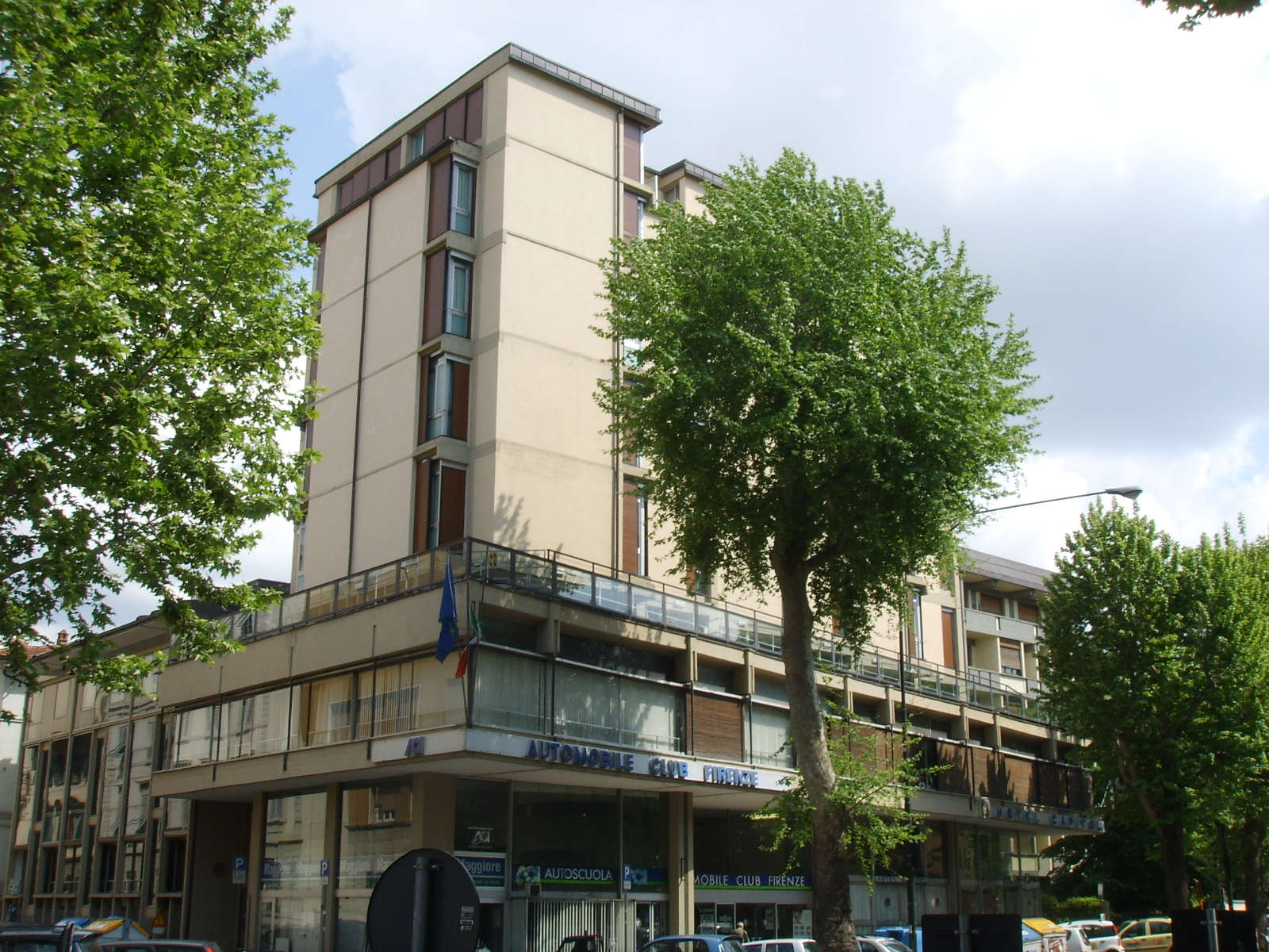 Sede aci